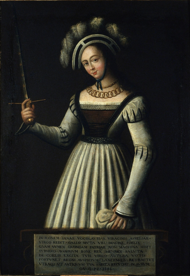 Portrait de Jeanne d'Arc, dit "portrait des échevins", Musée d'histoire et d'archéologie d'Orléans (Loiret, France), XVIe siècle.